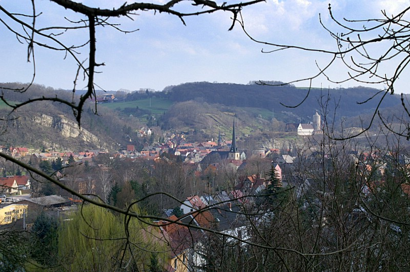 Blick Richtung südost über den Ort Camburg, rechts im Bild die Burg Camburg. Quelle: Bild selbst erstellt am 25.3.2007